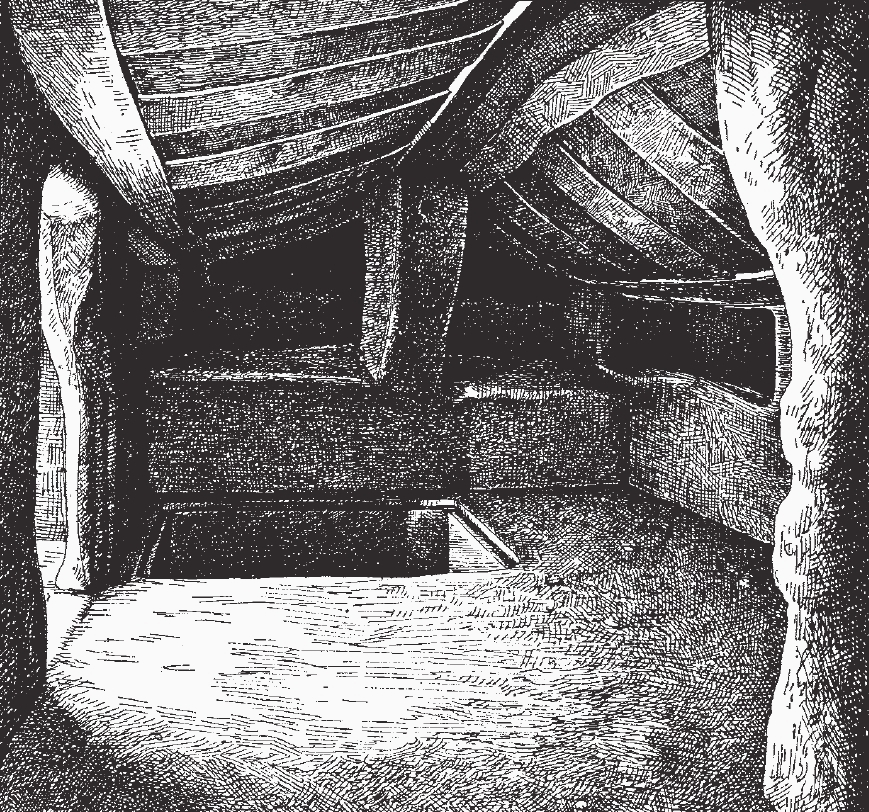 Disegno di Francesco Giarrizzo